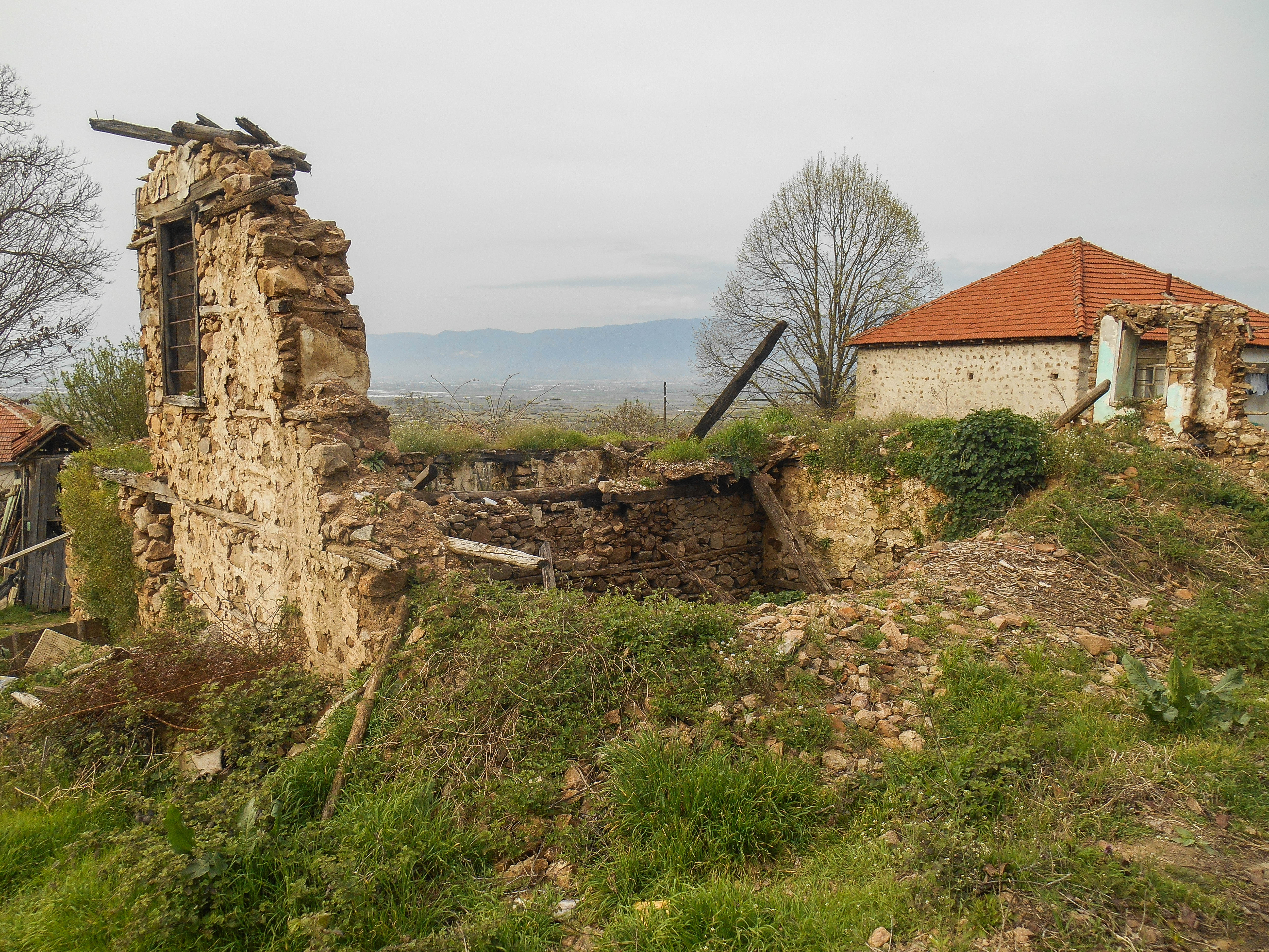 Стара куќа во селото